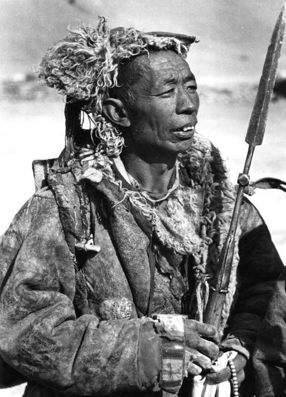 Gobschi-Ralung, Osttibeter